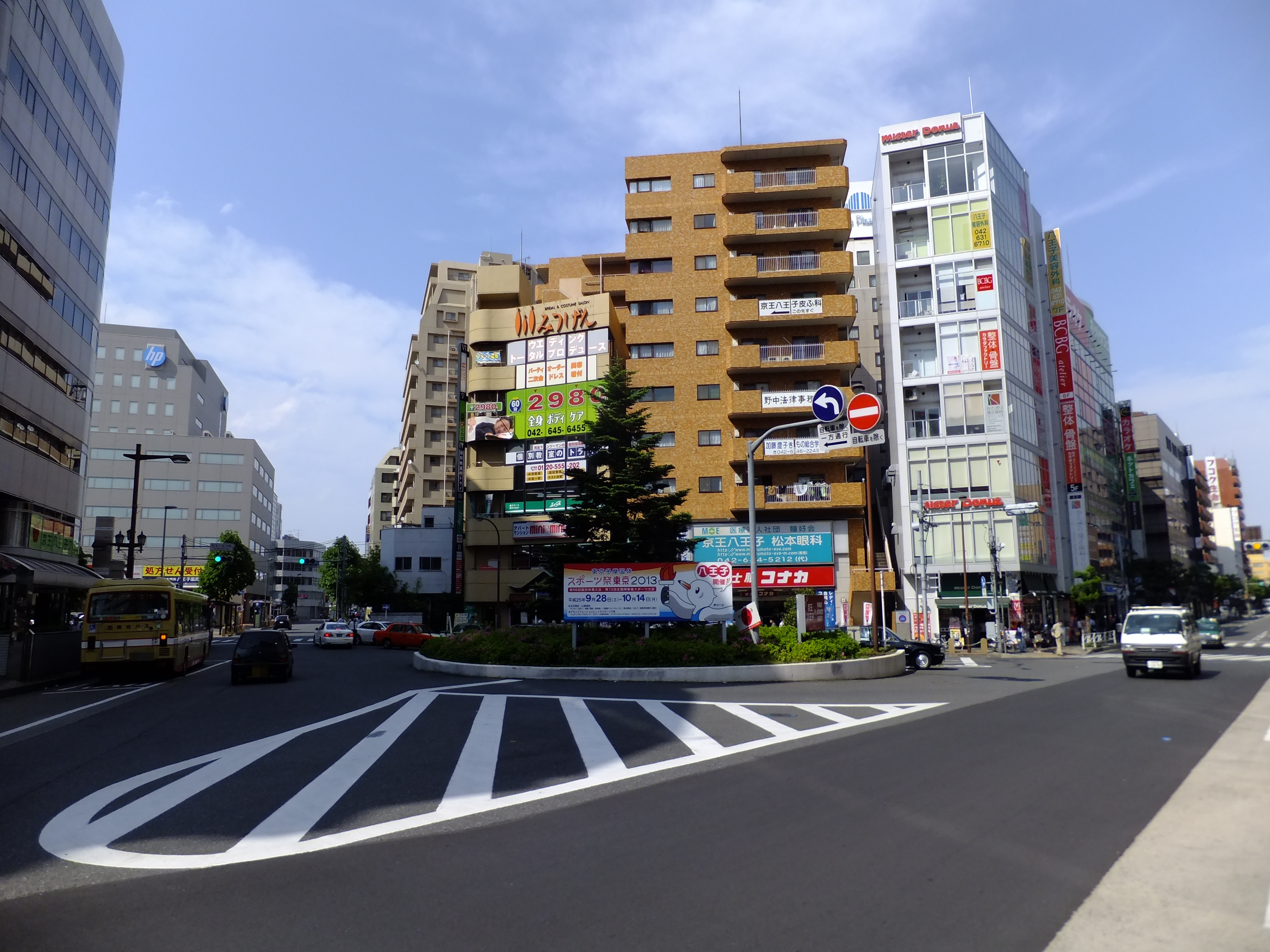 京王八王子駅前ロータリー